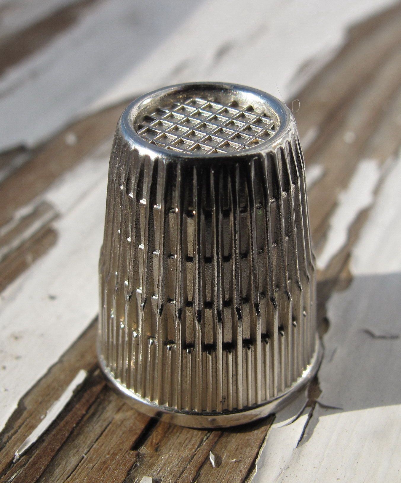 Alferga, dedal, Galiza